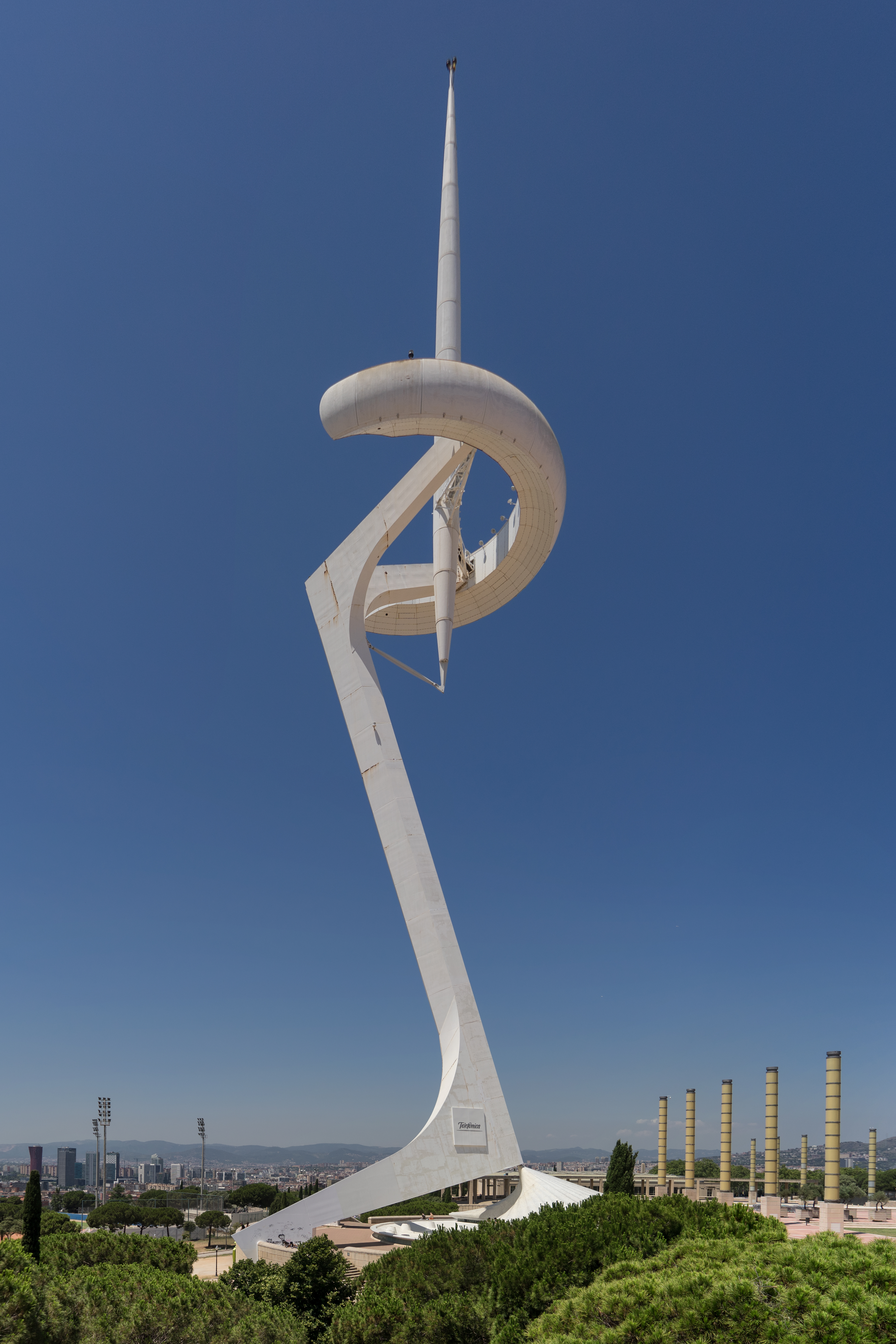 Torre de comunicacions de Montjuic, Barcelona, Calavatra